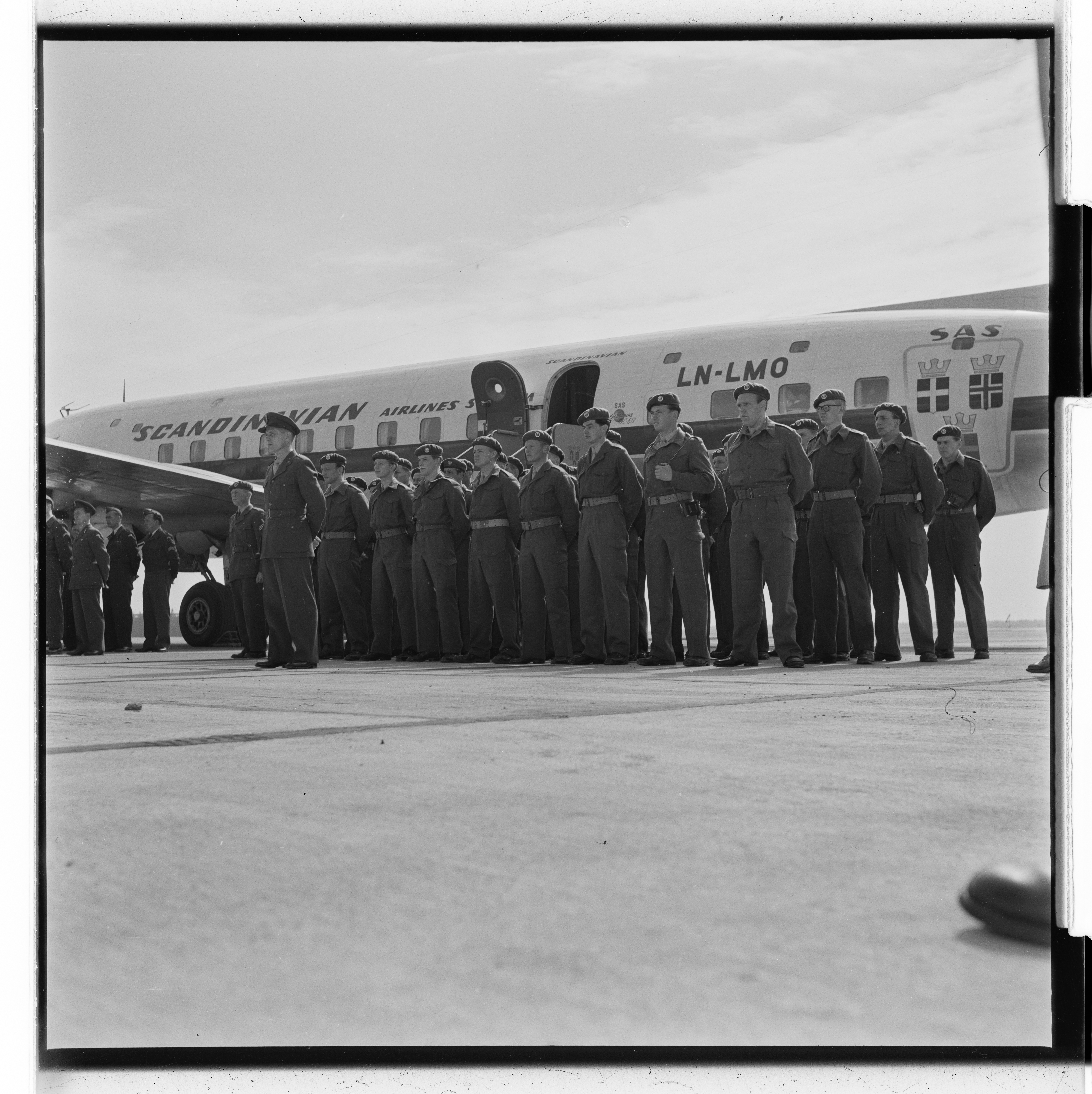 Bildet er hentet fra Arkivverket. Polflyvning, SAS-fly med mannskaper til Korea. NÅ nr. 13, 1953. Arkivinstitusjon : Riksarkivet Arkivnavn : Billedbladet NÅ Sted : Norge, Akershus, Ullensaker, Gardermoen Emneord: Polflyvninger, Fly Avbildet: Ukjent